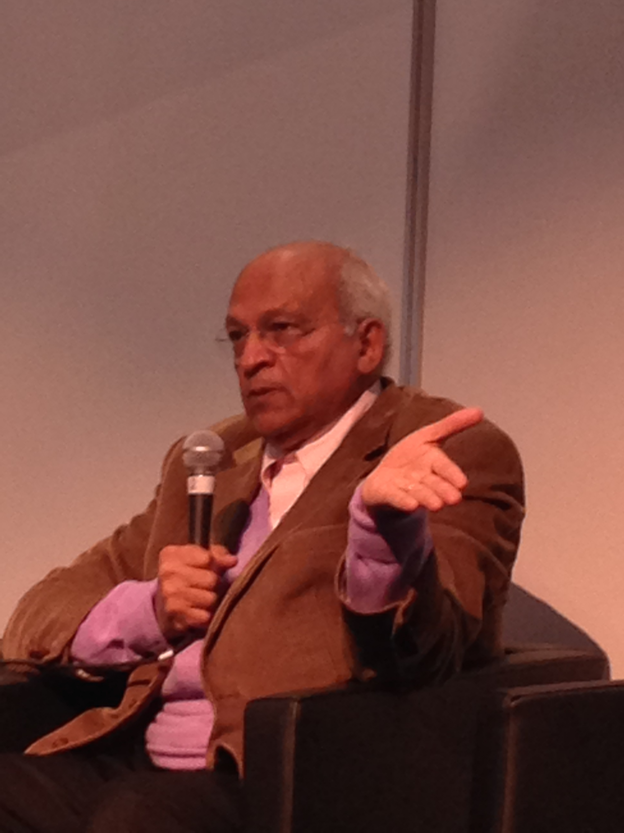 Gamal Ghitany au Salon international du livre et de la presse de Genève